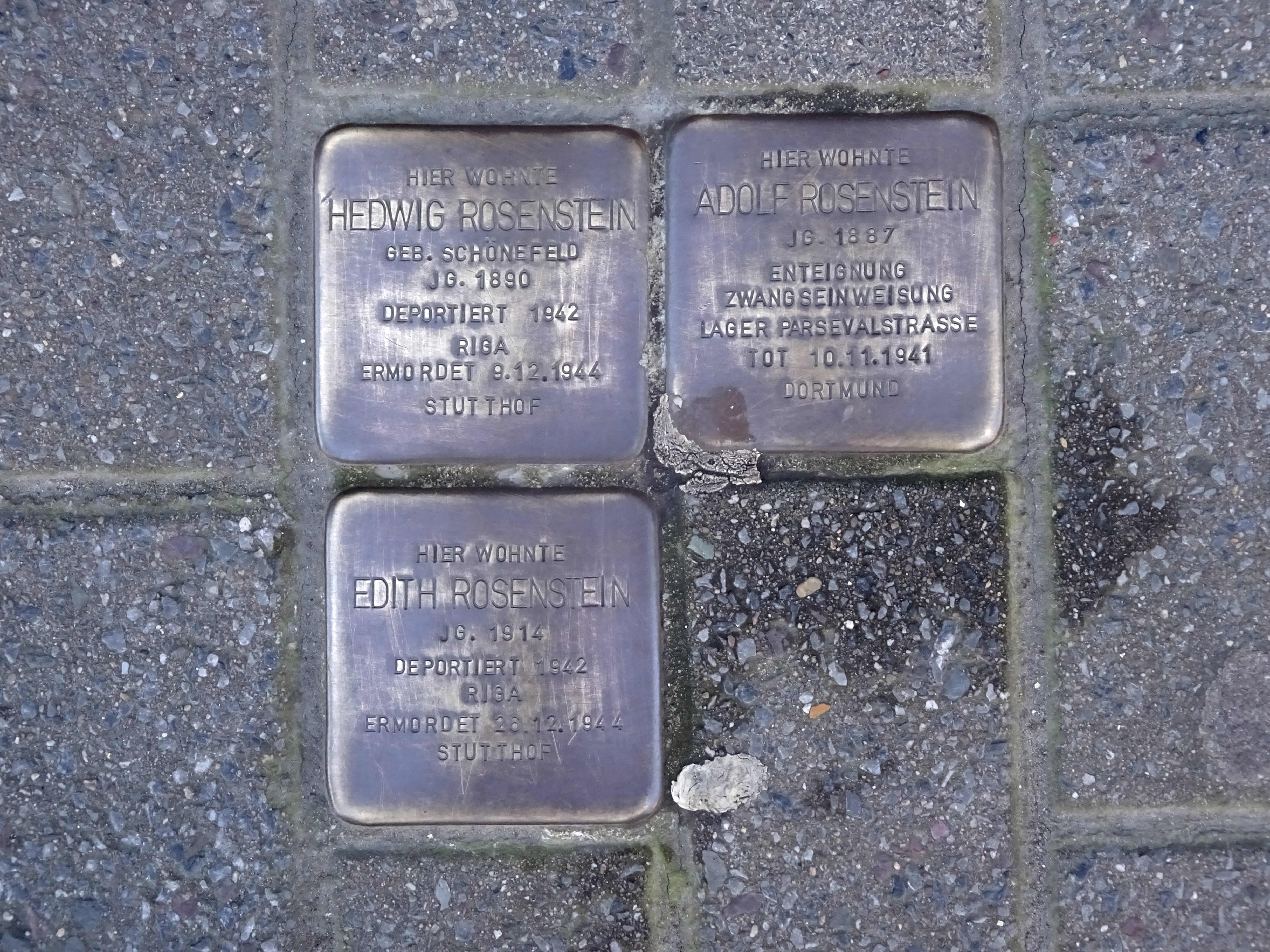 Stolpersteine am Haus Altenderner Str. 6 in Dortmund